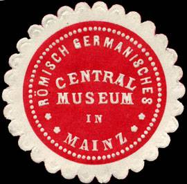 Sealing stamp Title: Römisch Germanisches Central Museum in Mainz Description: rot, weiß, geprägt Place: Mainz size: 4 cm